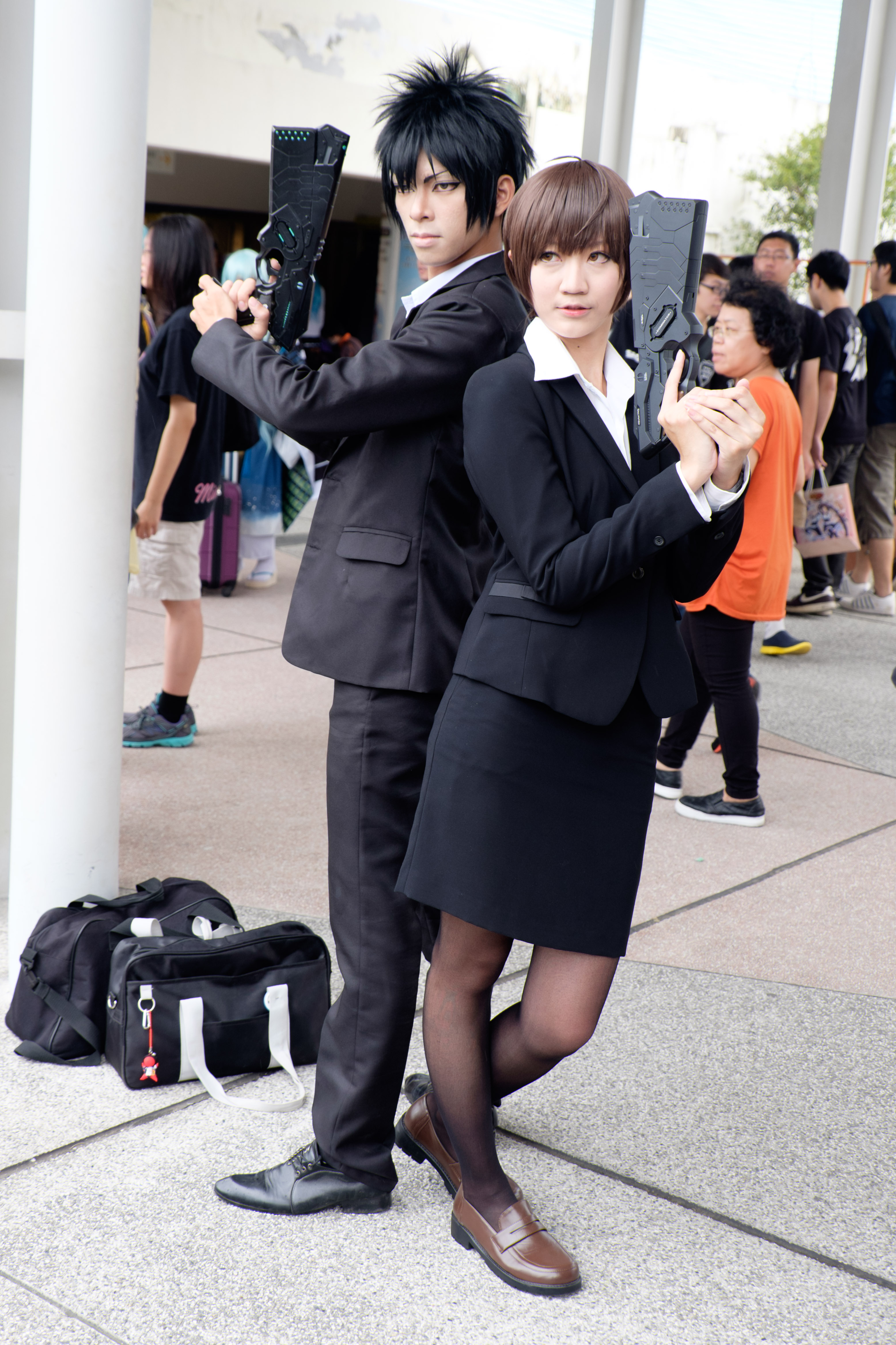 Fancy Frontier 26第二日下午，＜サイコパス＞狡嚙慎也（左）與常守朱（右）Cosplayers。